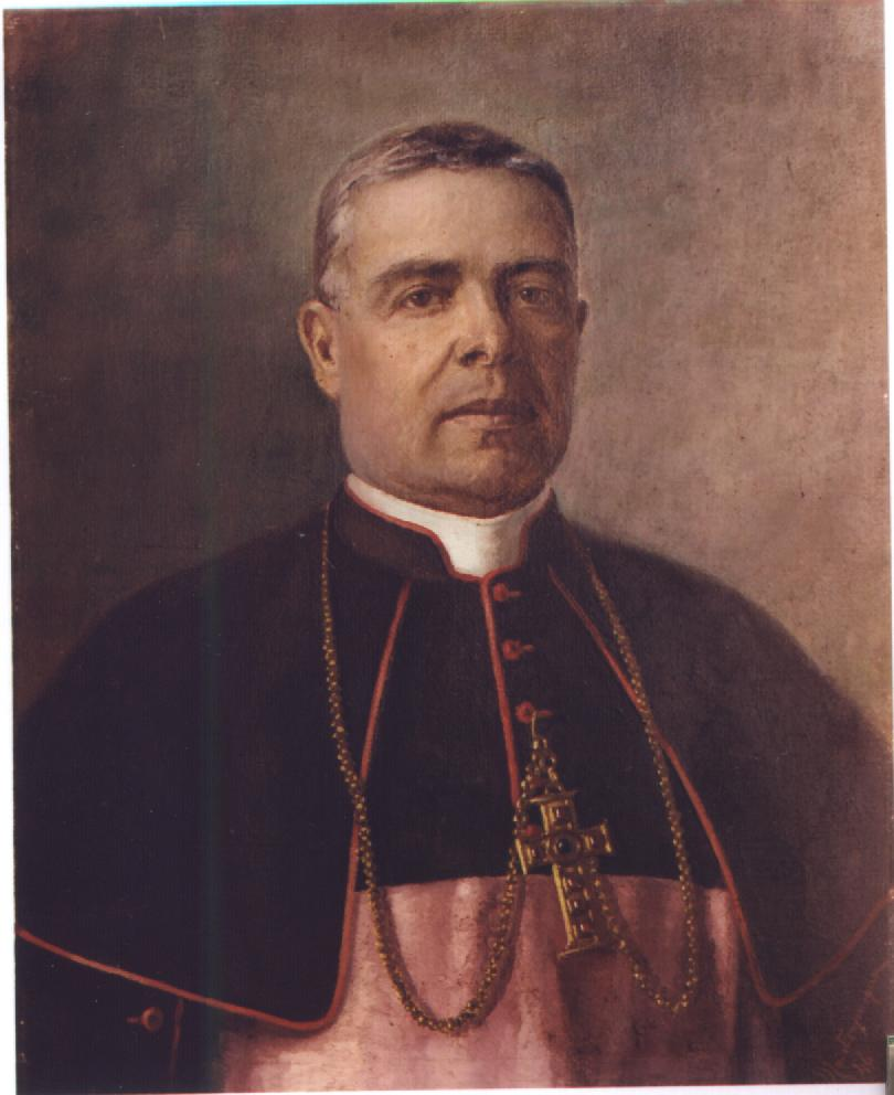 Mons. Nicola Monterisi, arcivescovo di Salerno, olio su tela, XXI sec., Chiesa di San Gioavanni di Dio in Barletta.